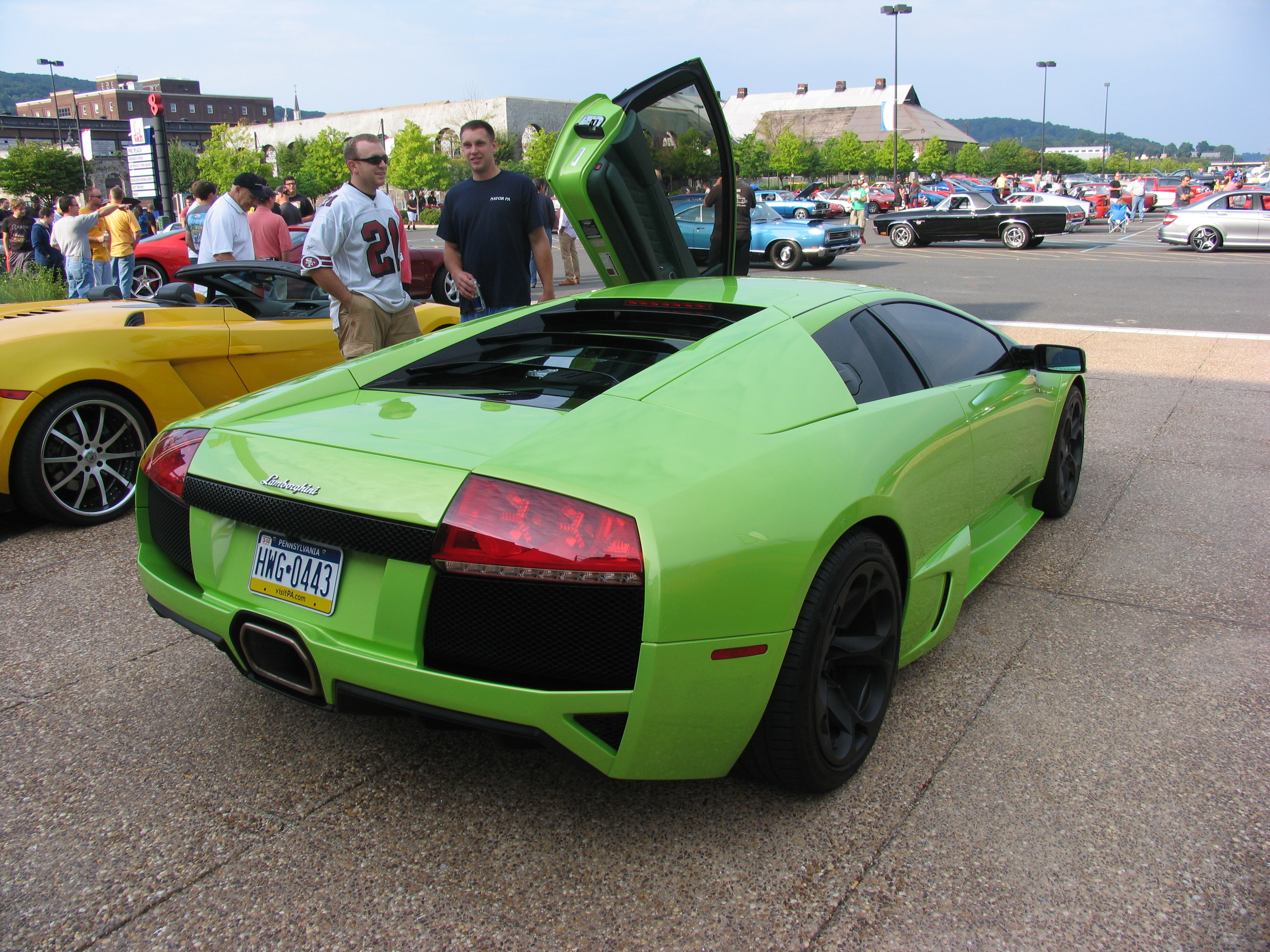 Lamborghini Murcielago LP640-4